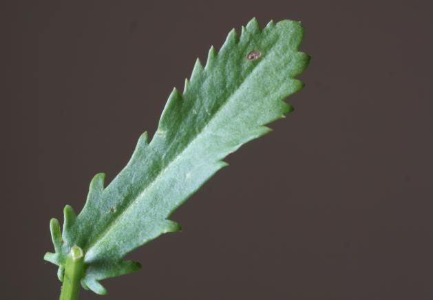 Margherita diploide – Località: Villa Prima, Limana (BL), 350 m s.l.m.